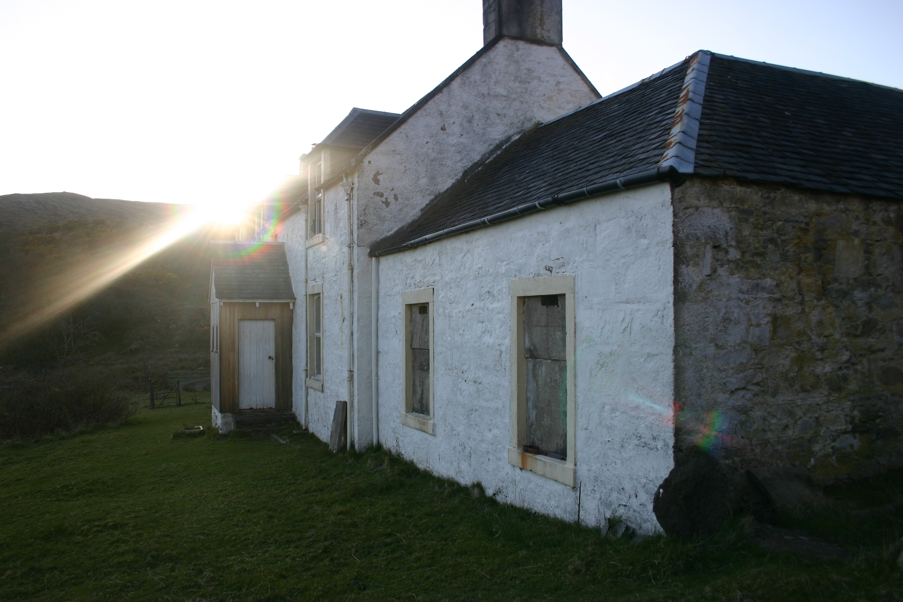 Barnhill (Orwell's 1984)